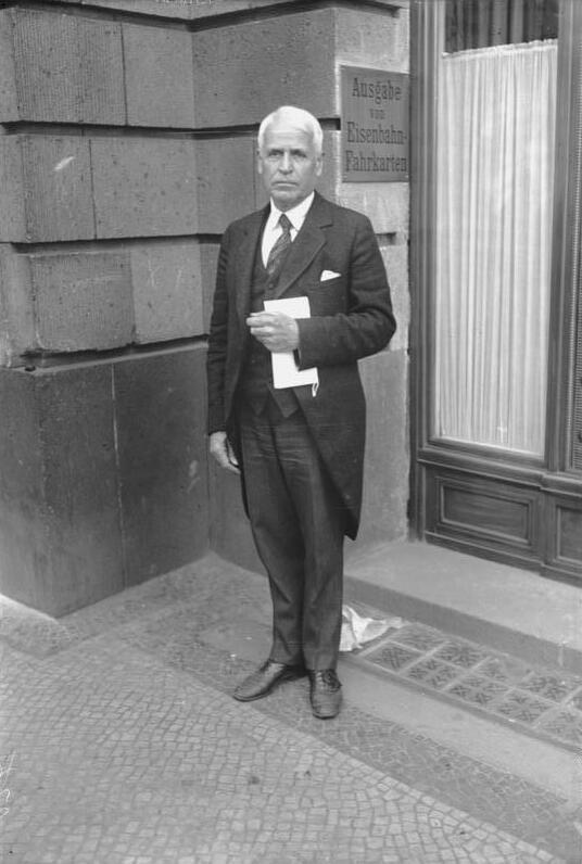 Der bekannte Hotelkönig Statler, der Besitzer des größten Hotels der Welt des Pensylvania - Hotels in New York, welches 3.000 Betten hat, ist 65 Jahre alt, gestorben. Unser Bild zeitgt ihn bei seinem letzten Besuch in Berlin vor dem Hotel Adlon.